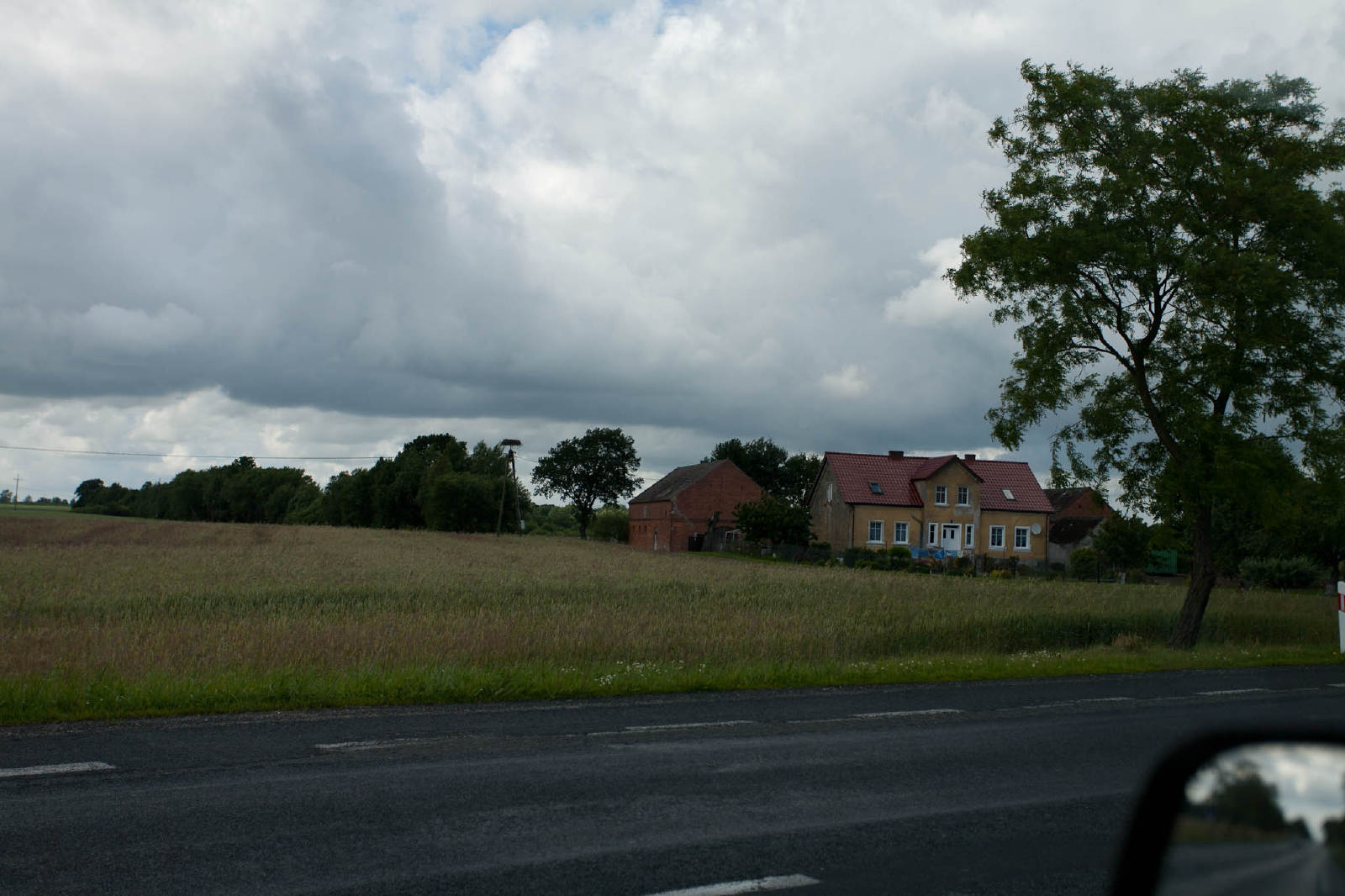 Krzywopłoty